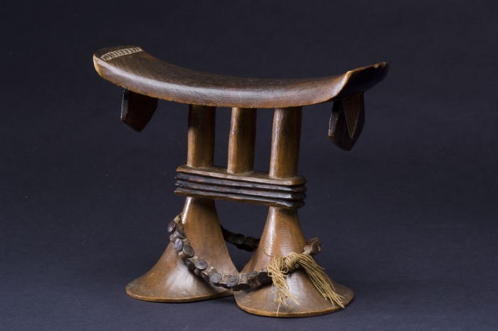 Dient ter ondersteuning van het hoofd tijdens slaap en rust.